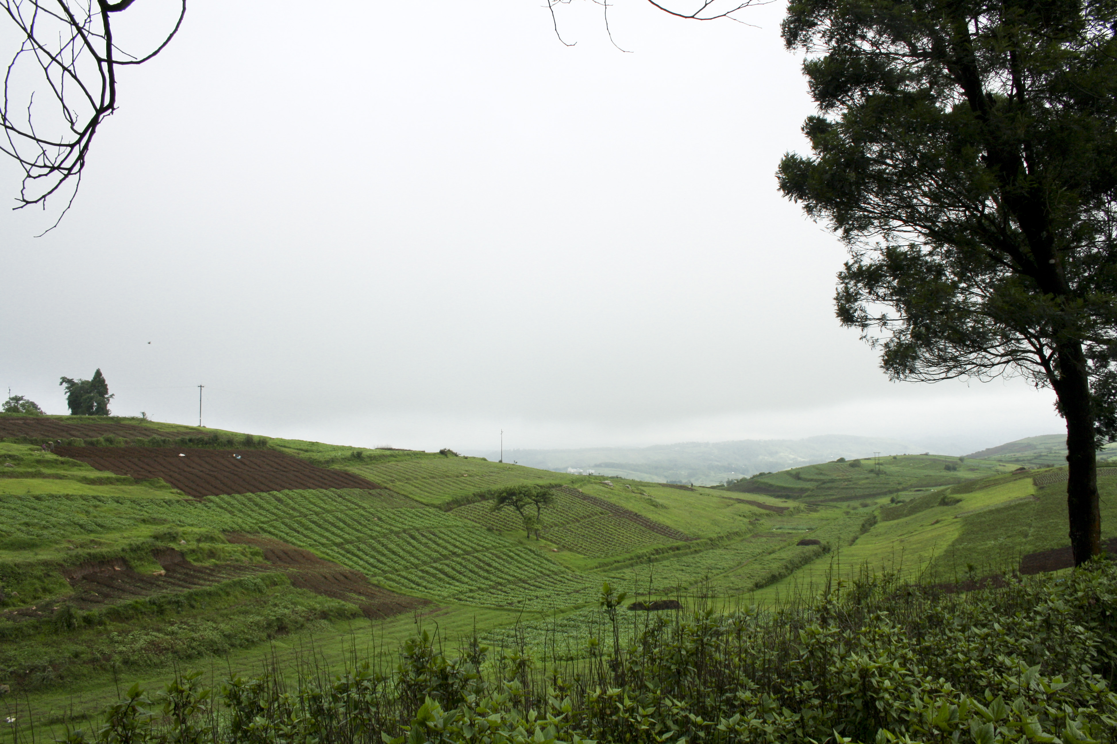 Agriculture, Farms, Nature